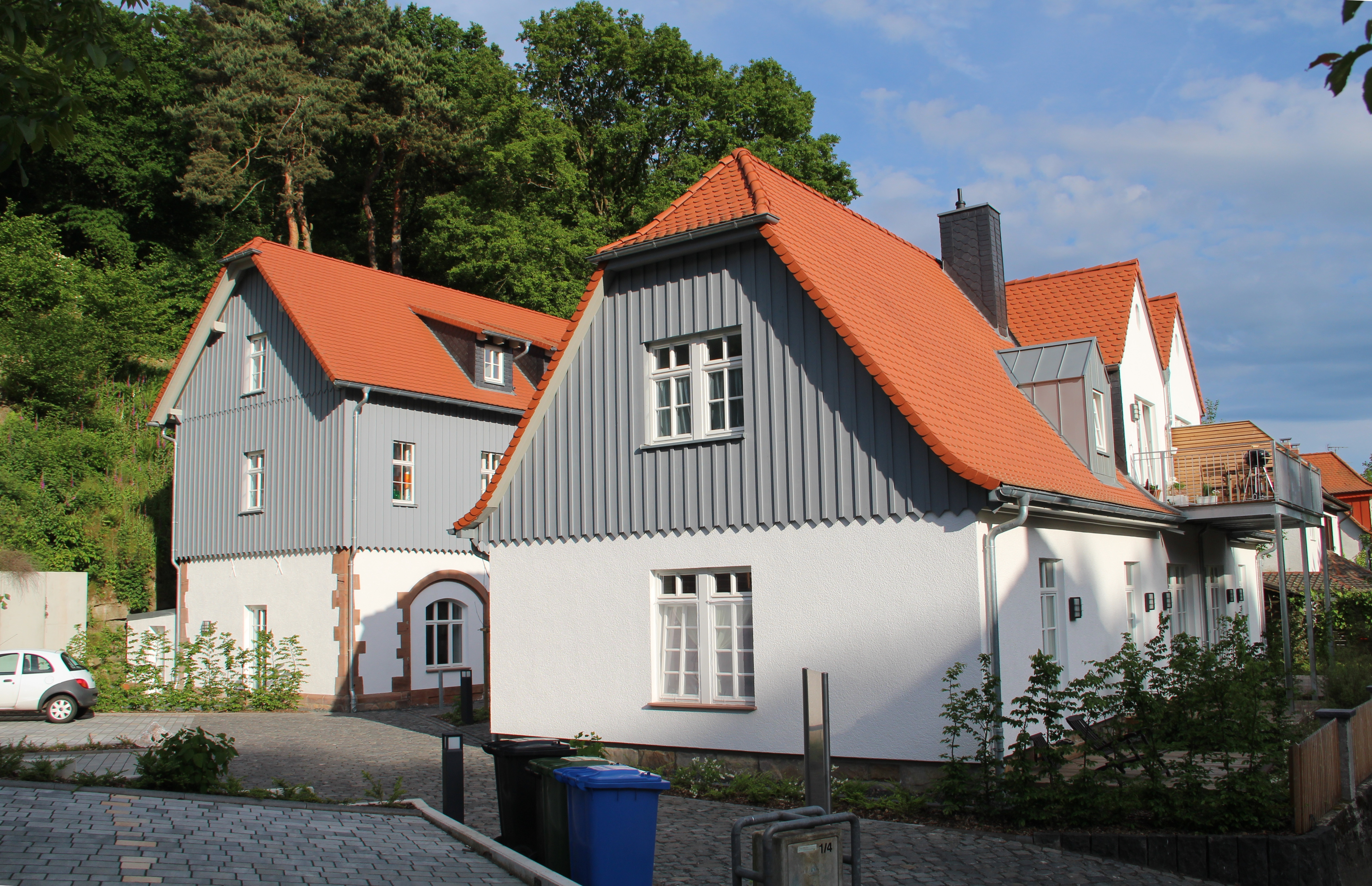 Station der Behring-Route in Marburg. Siehe auch